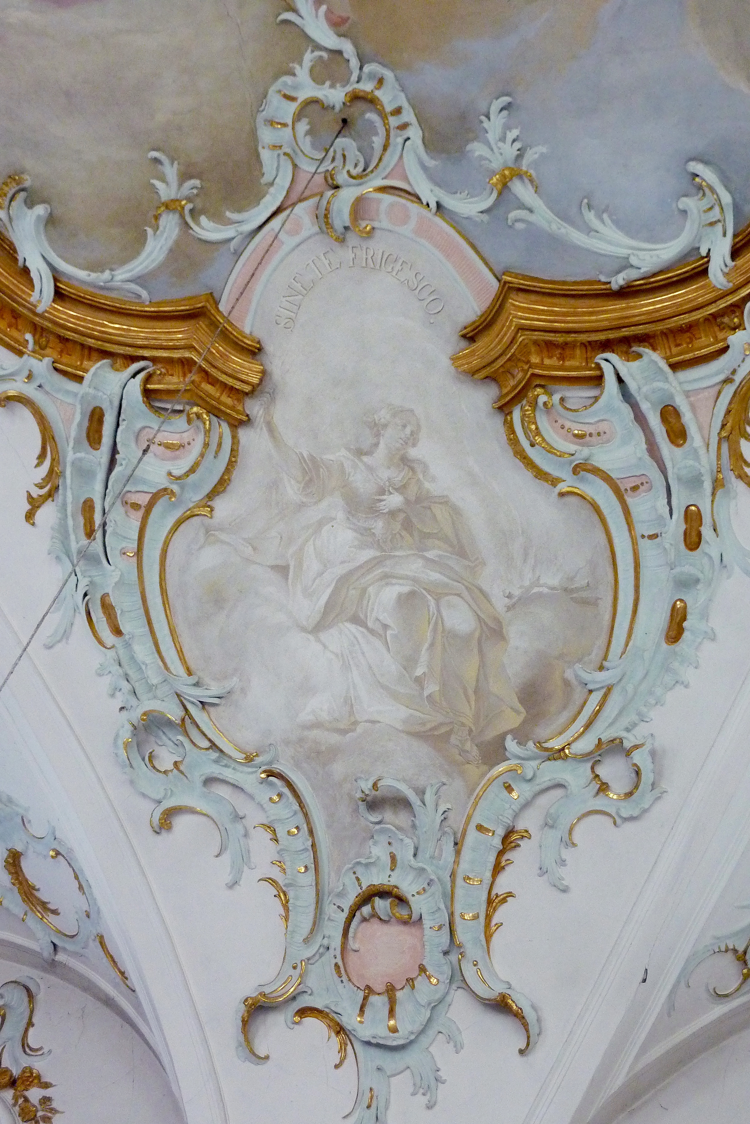 Katholische Pfarr- und Wallfahrtskirche Mariä Heimsuchung in Gottmannshofen, einem Stadtteil von Wertingen im Landkreis Dillingen an der Donau (Bayern), Stuck von Franz Xaver Feuchtmayer d. Älteren (1698–1763), Grisaille von Johann Baptist Enderle (1725–1798). Kartusche mit allegorischer Frauengestalt, Sinnbild des Feuers, Inschrift: „Sine te frigesco“ (ohne dich erfriere ich).